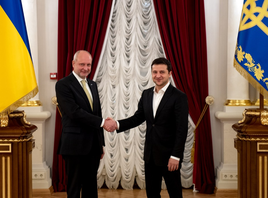 Президент України Володимир Зеленський прийняв вірчі грамоти у послів низки іноземних держав: ЄС – Матті Маасікас